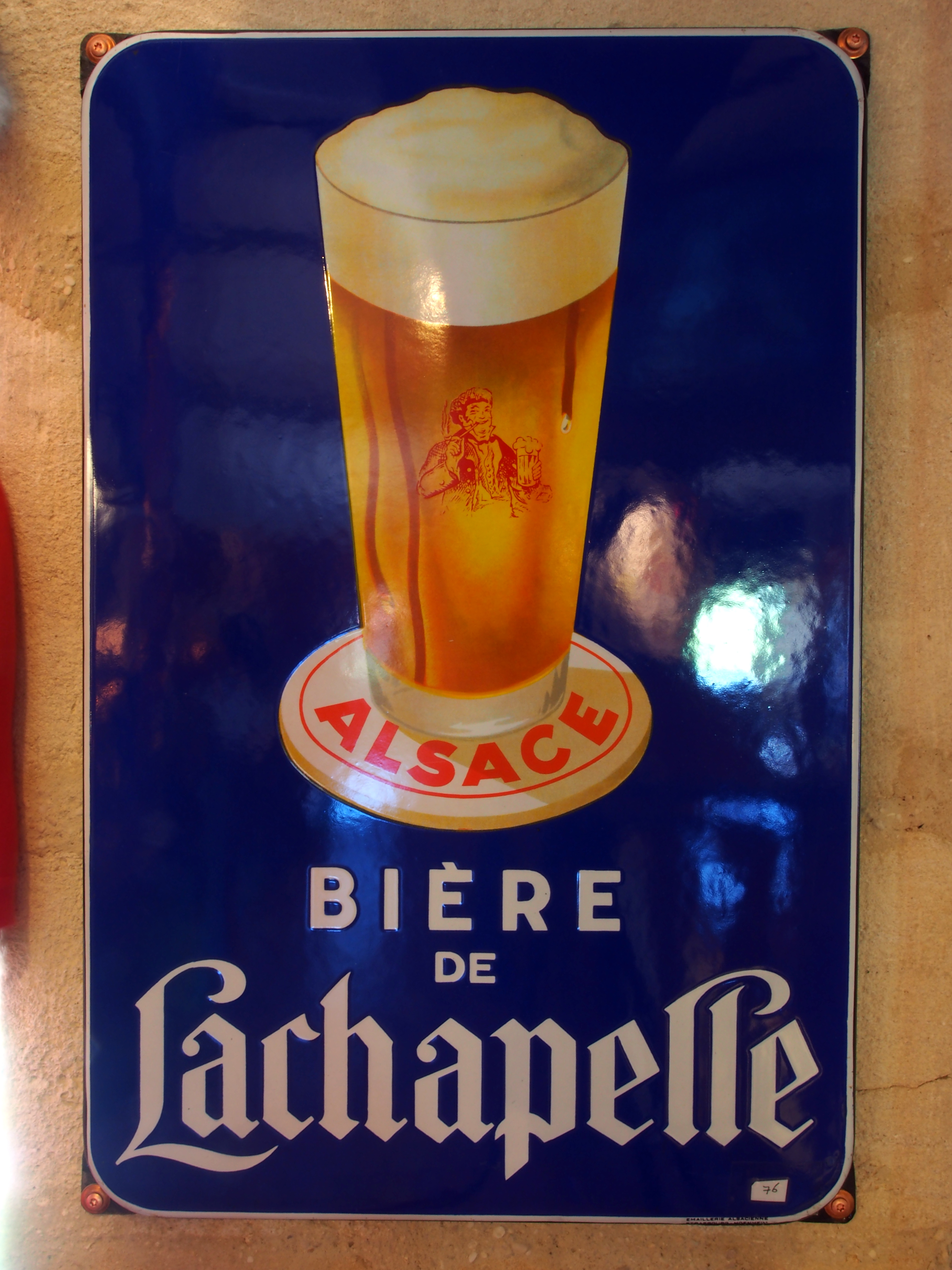 Bière de Lachapelle , enamel advertising sign at the Musée Européen de la Bière.